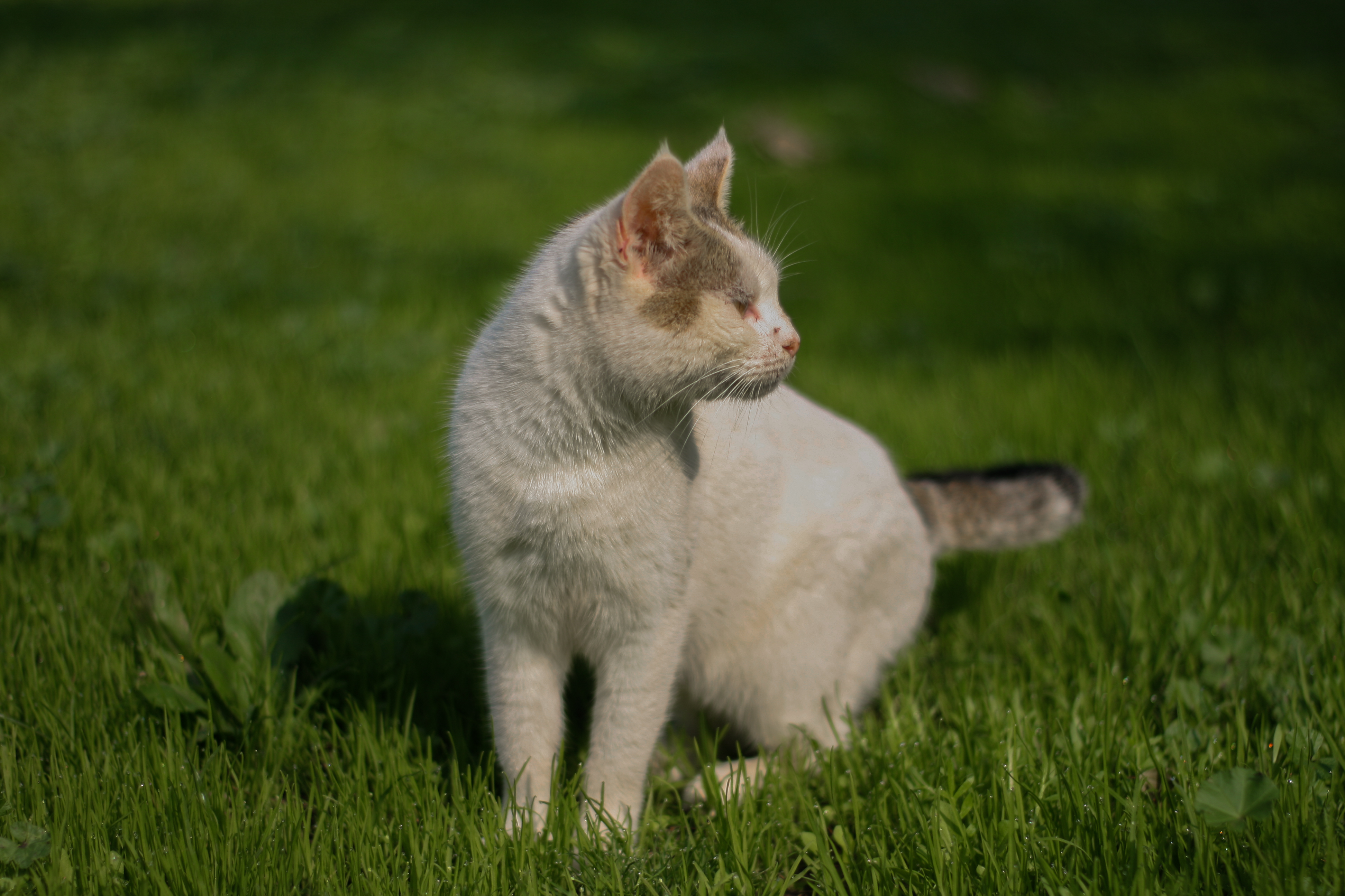 צילום של חתול בעל פרווה לבנה. צולם בפארק הירדן, ינואר 2017.